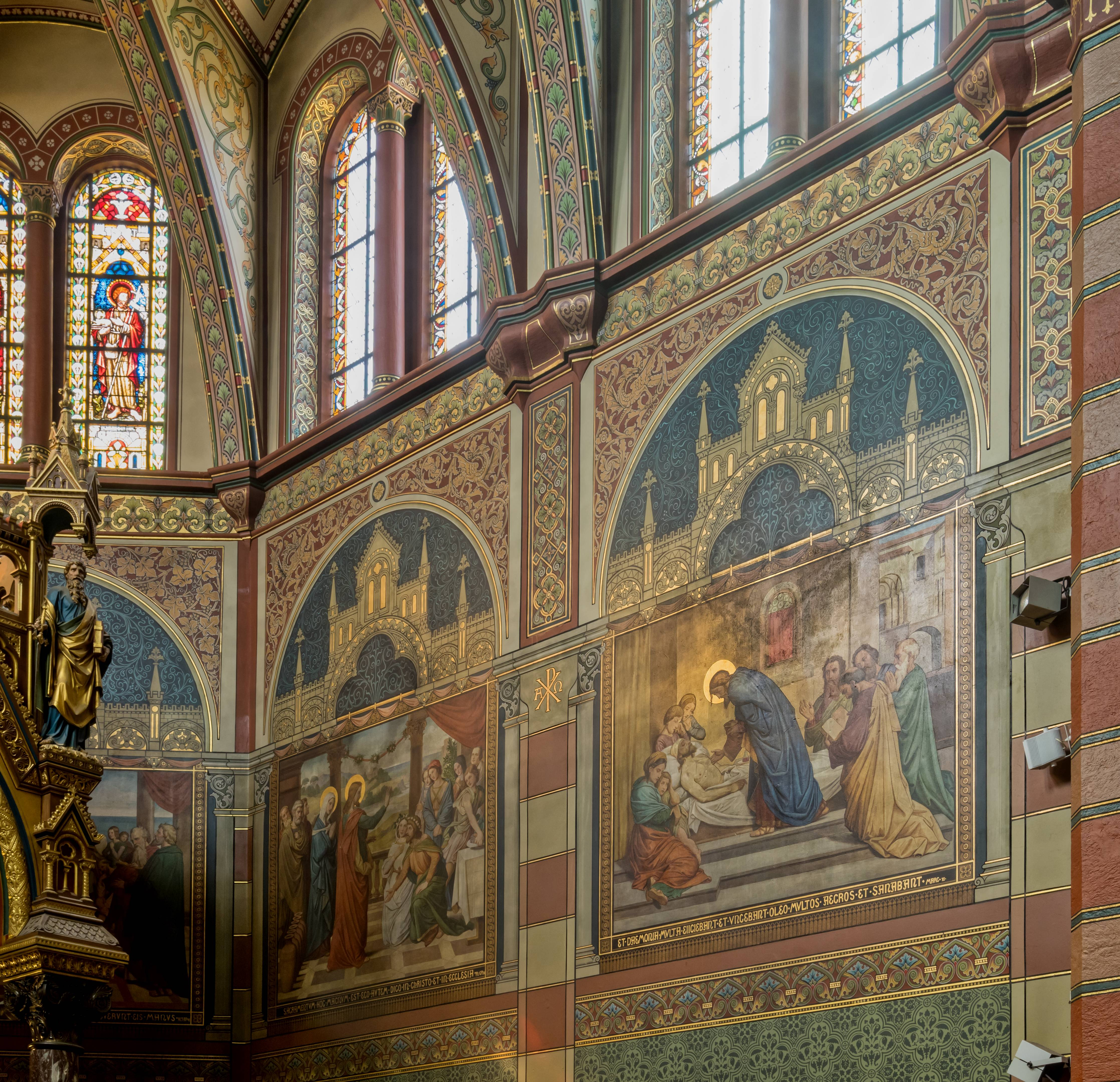 St. Peter und Paul in Bonndorf